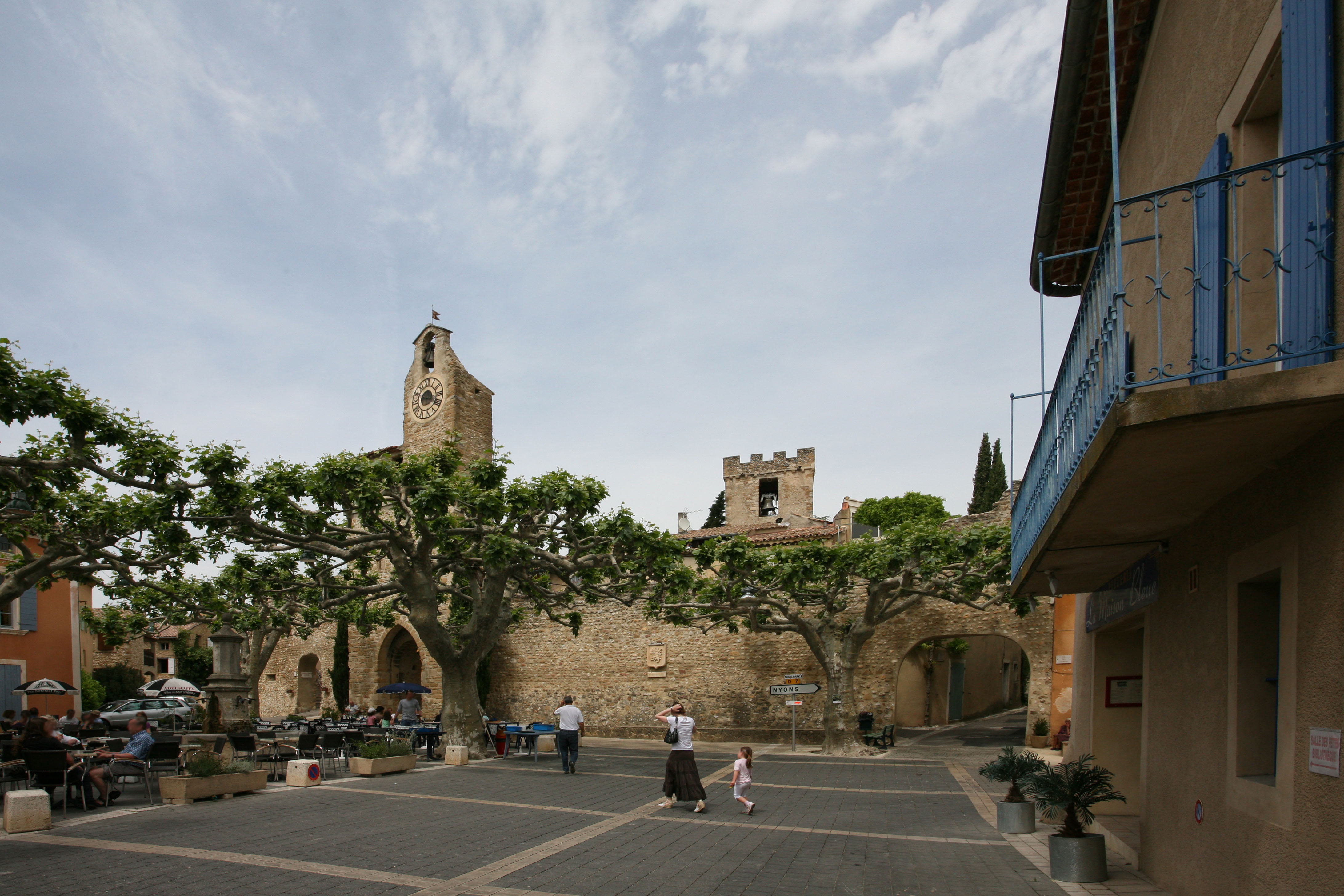 Villedieu, place devant la mairie (Vaucluse)